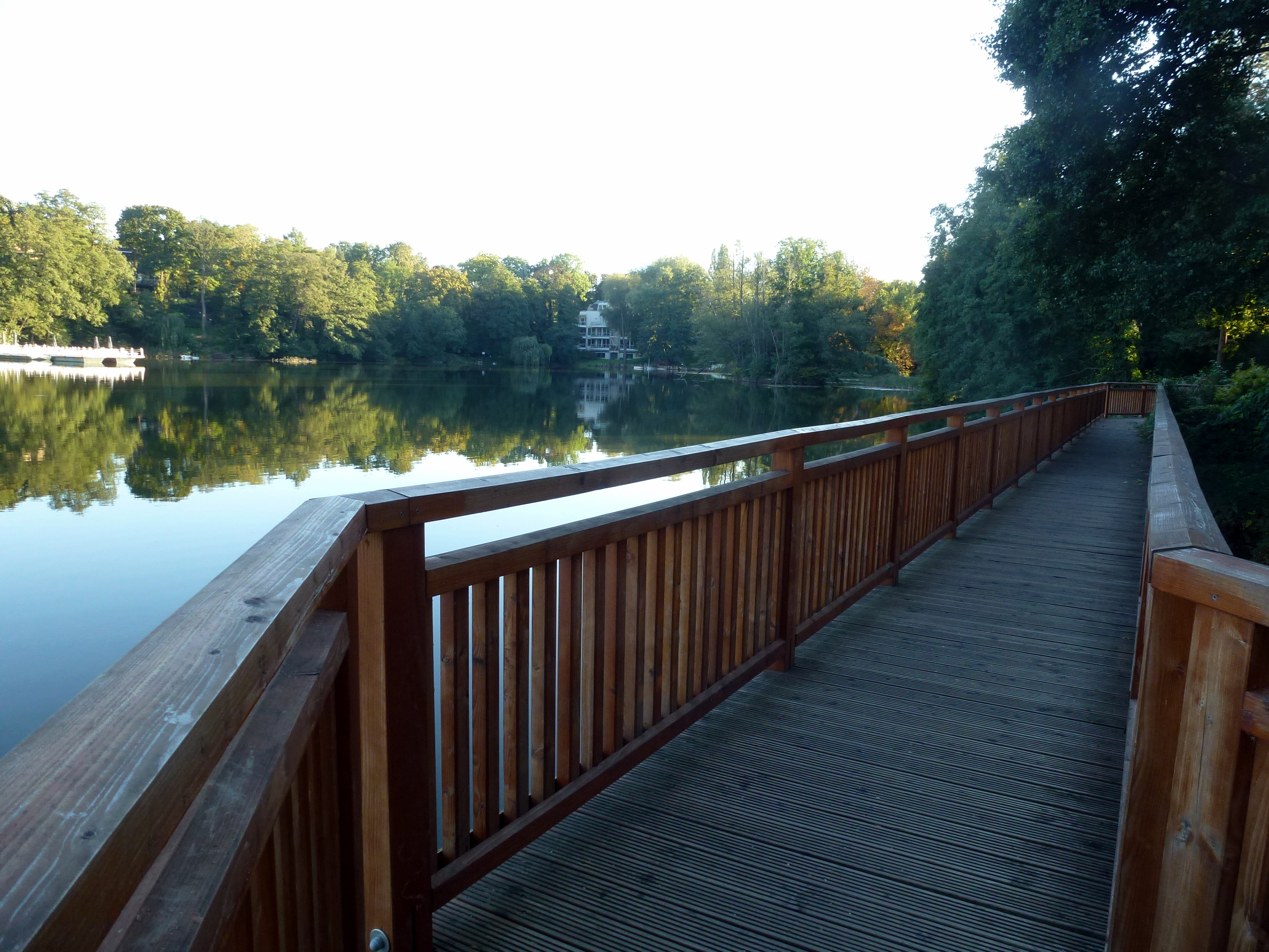 Berlin-Grunewald Halensee Steg